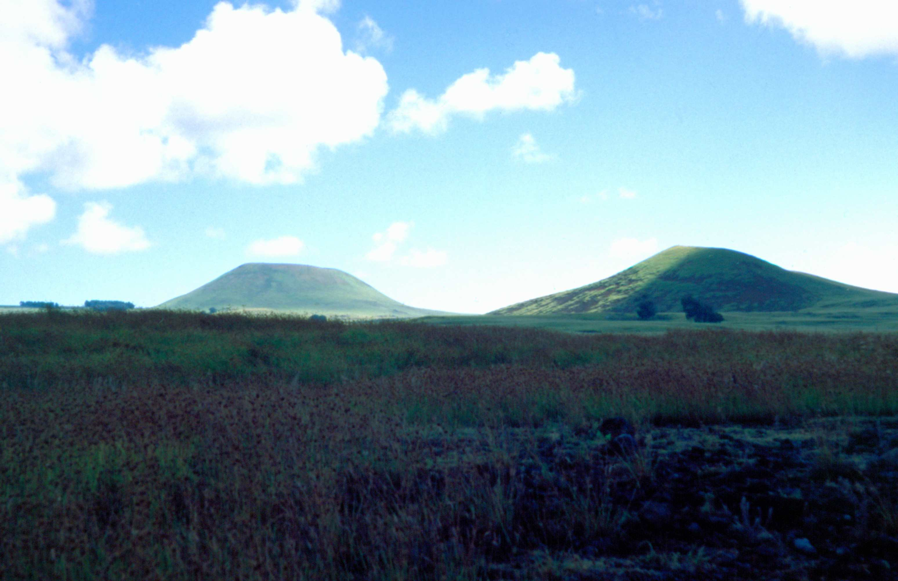 Die Vulkane Poike (links) und Rano Raraku (rechts) auf der Osterinsel